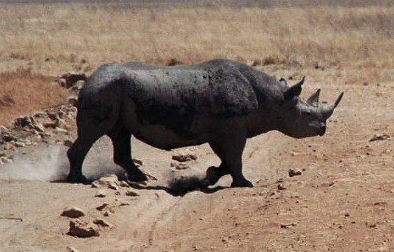 Black Rhyno, Ngorongoro Crater, Tanzania